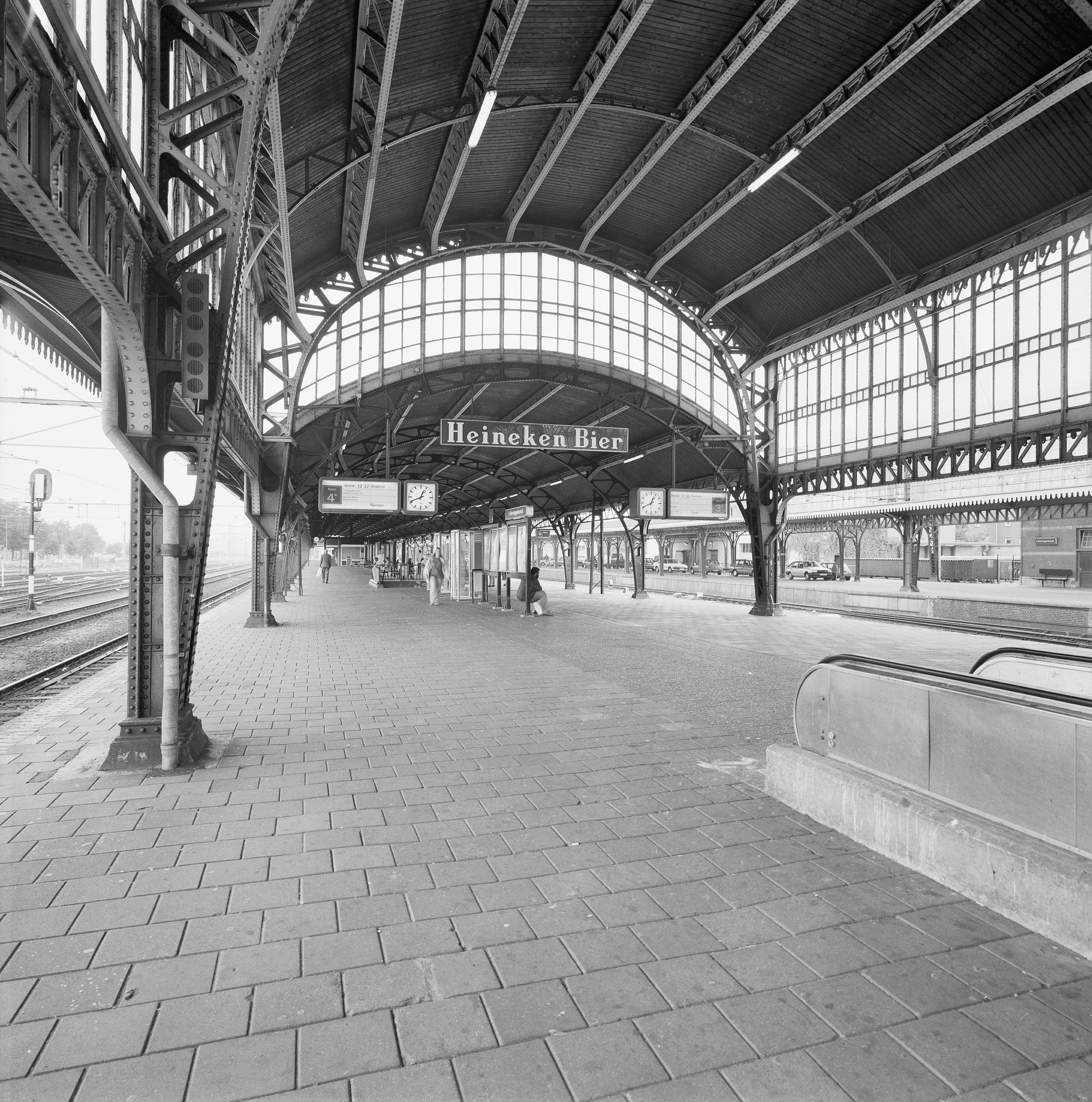 Station: INTERIEUR, OVERZICHT PERRON, OVERKAPPING